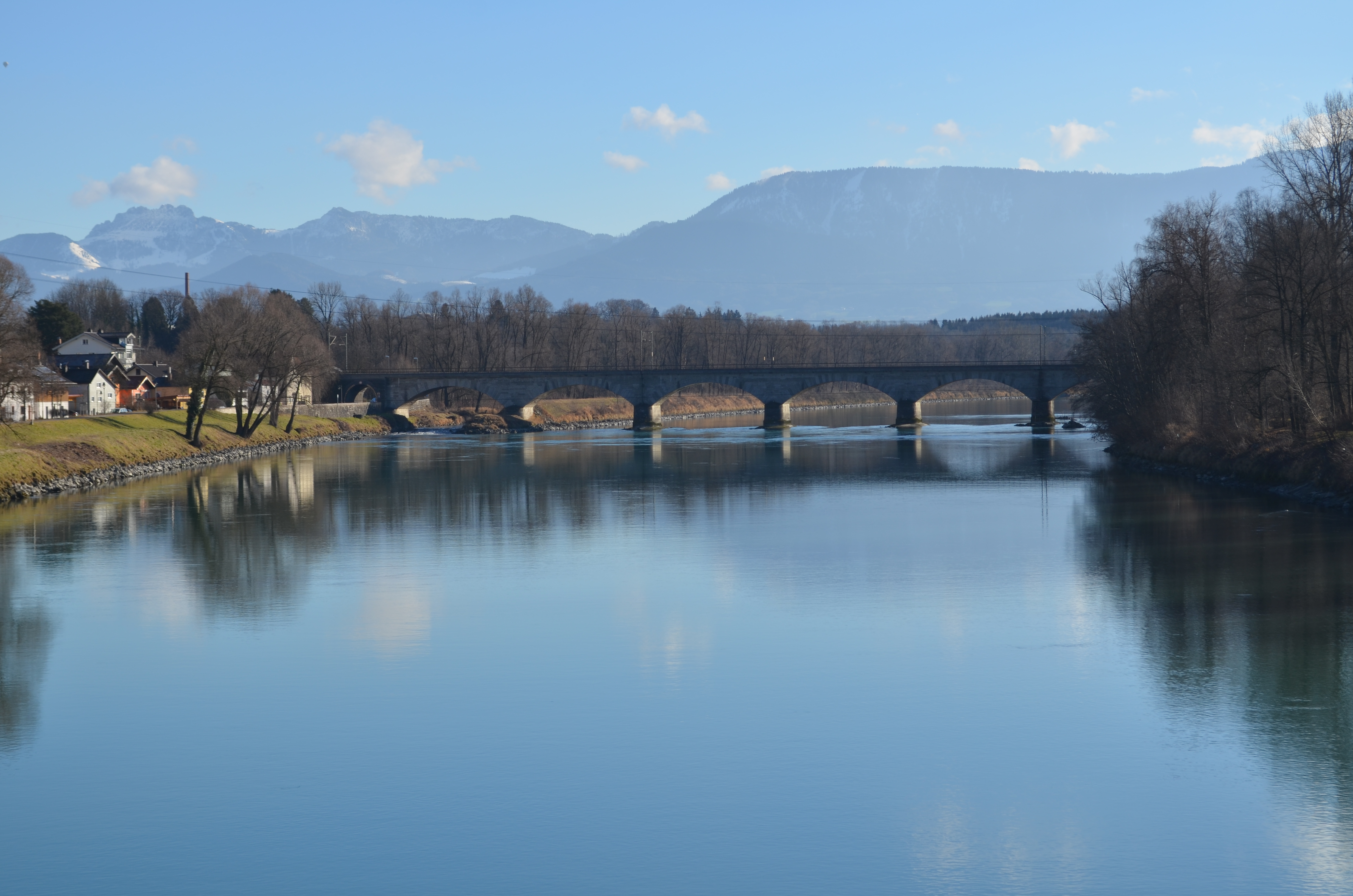 Innbrücke Rosenheim